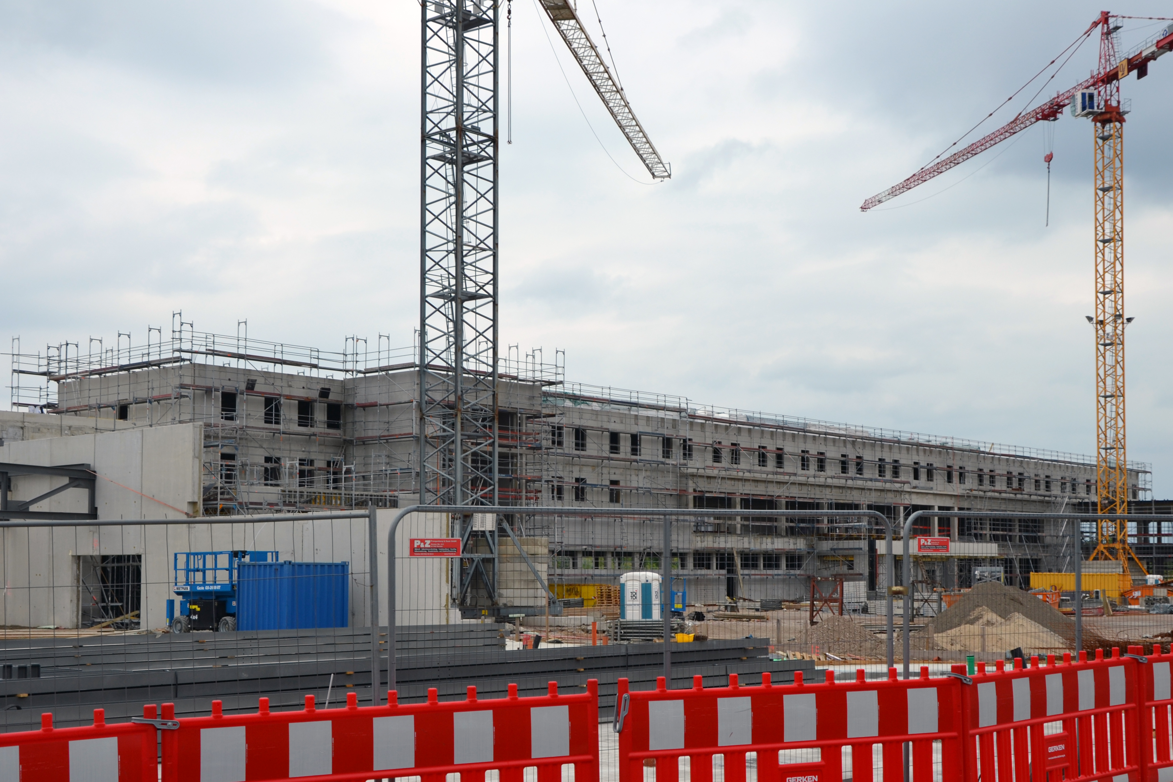 Essen-Westviertel, Krupp-Gürtel, QuartierWest im Bau